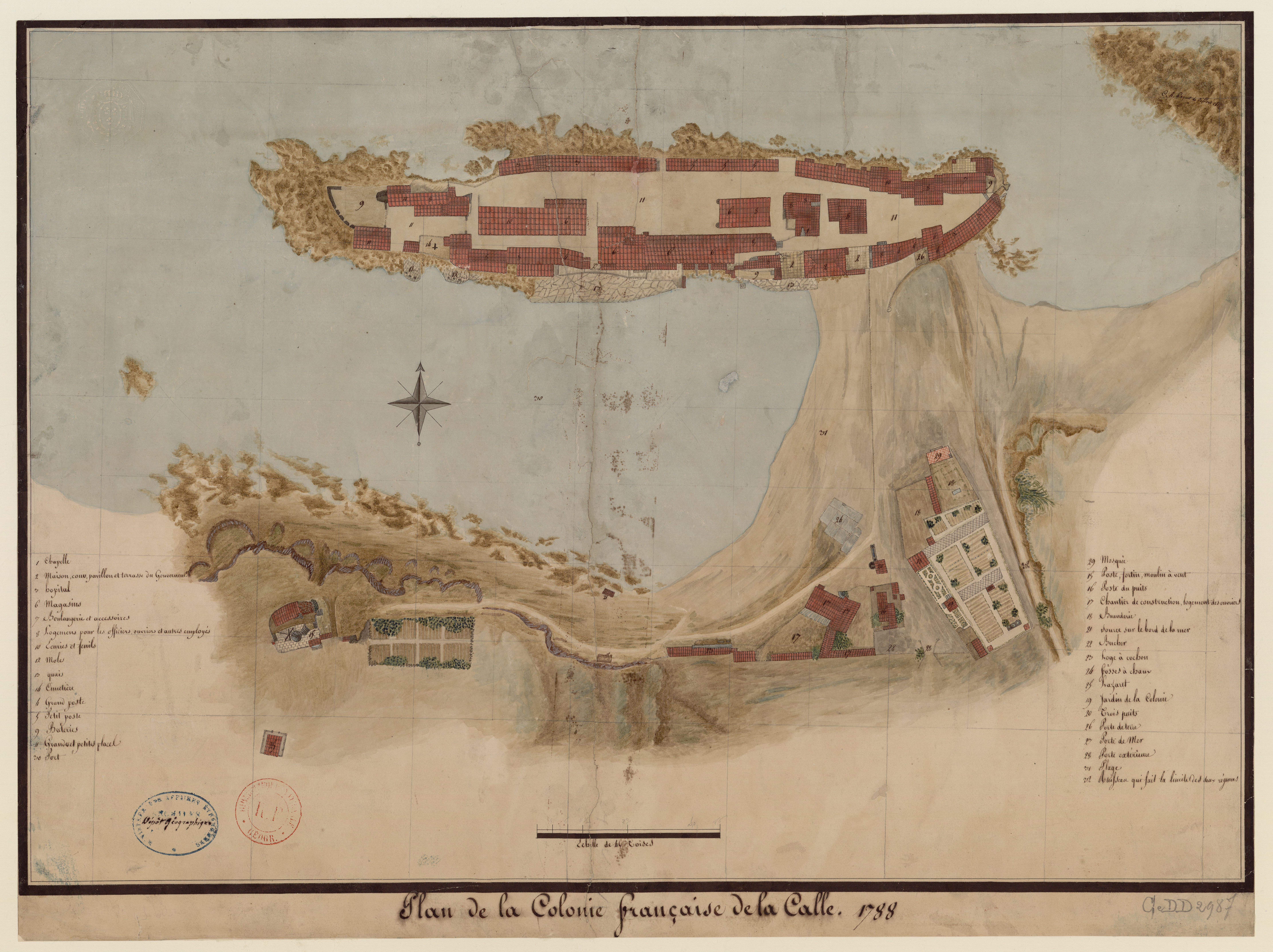 Plan de la colonie française de La Calle, El Kala (El Tarf, Algérie) : -(FR-BnF 15323968m) , 1788